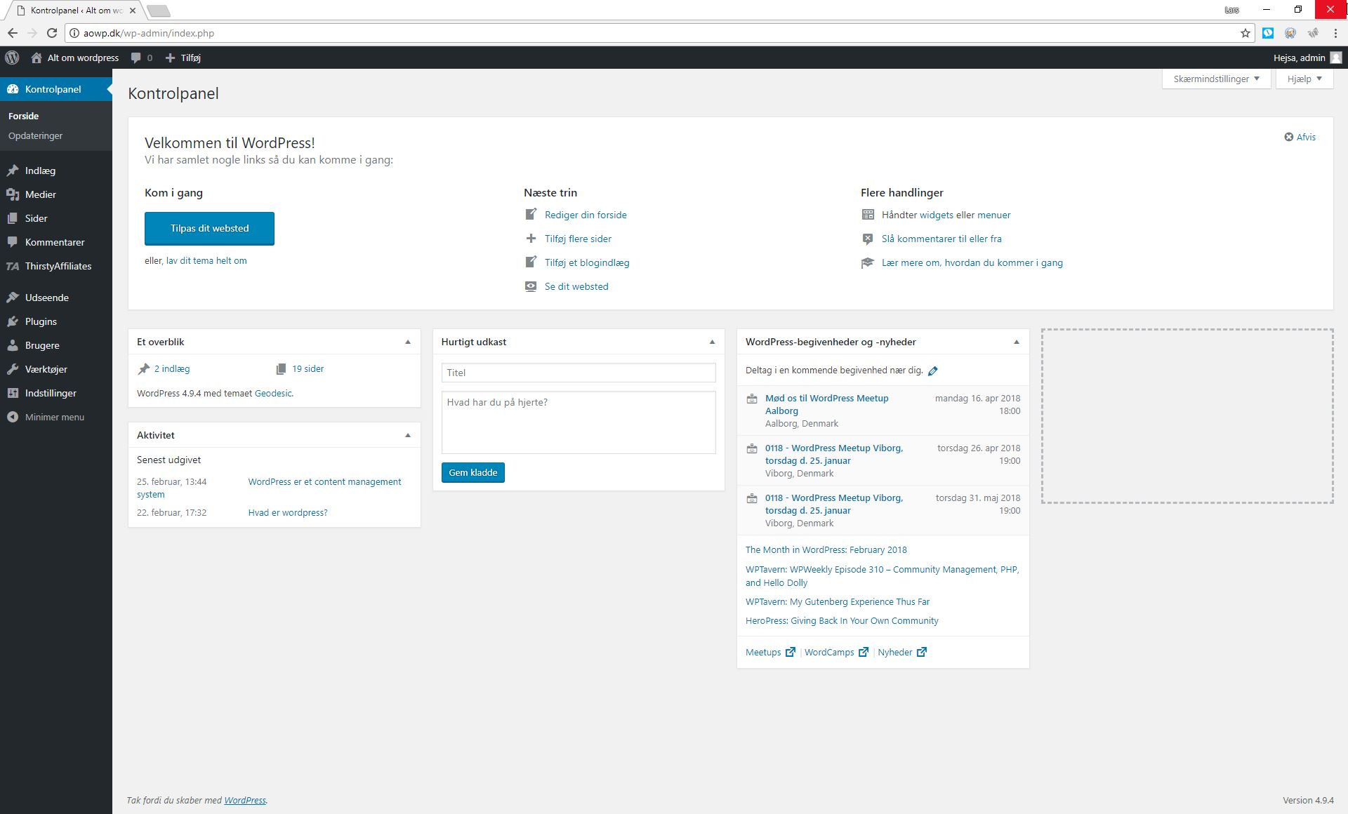 Backend i wordpress, hvor der er adgang til indstillinger og udgivelse af nyt indhold. Login i backend kræver brugernavn og adgangskode, og er forbehold administratører og bidragsydere på siden. Skærmbilleder er fra wordpress version 4.9.4